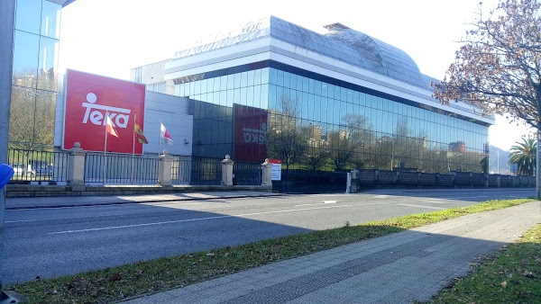 Sede de Teka España en Santander